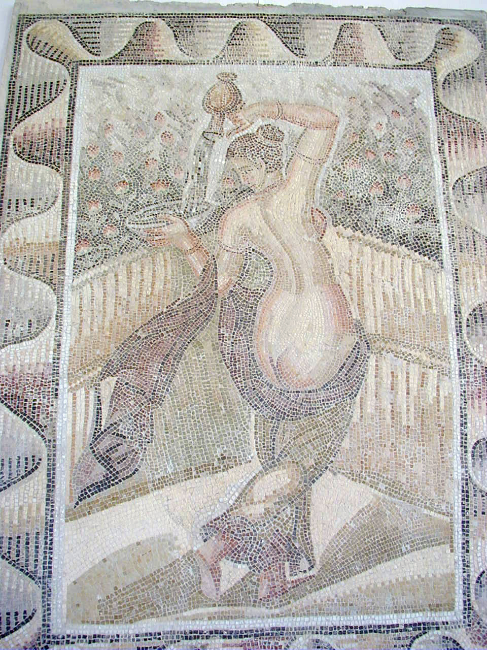 Mosaïque du musée de Carthage